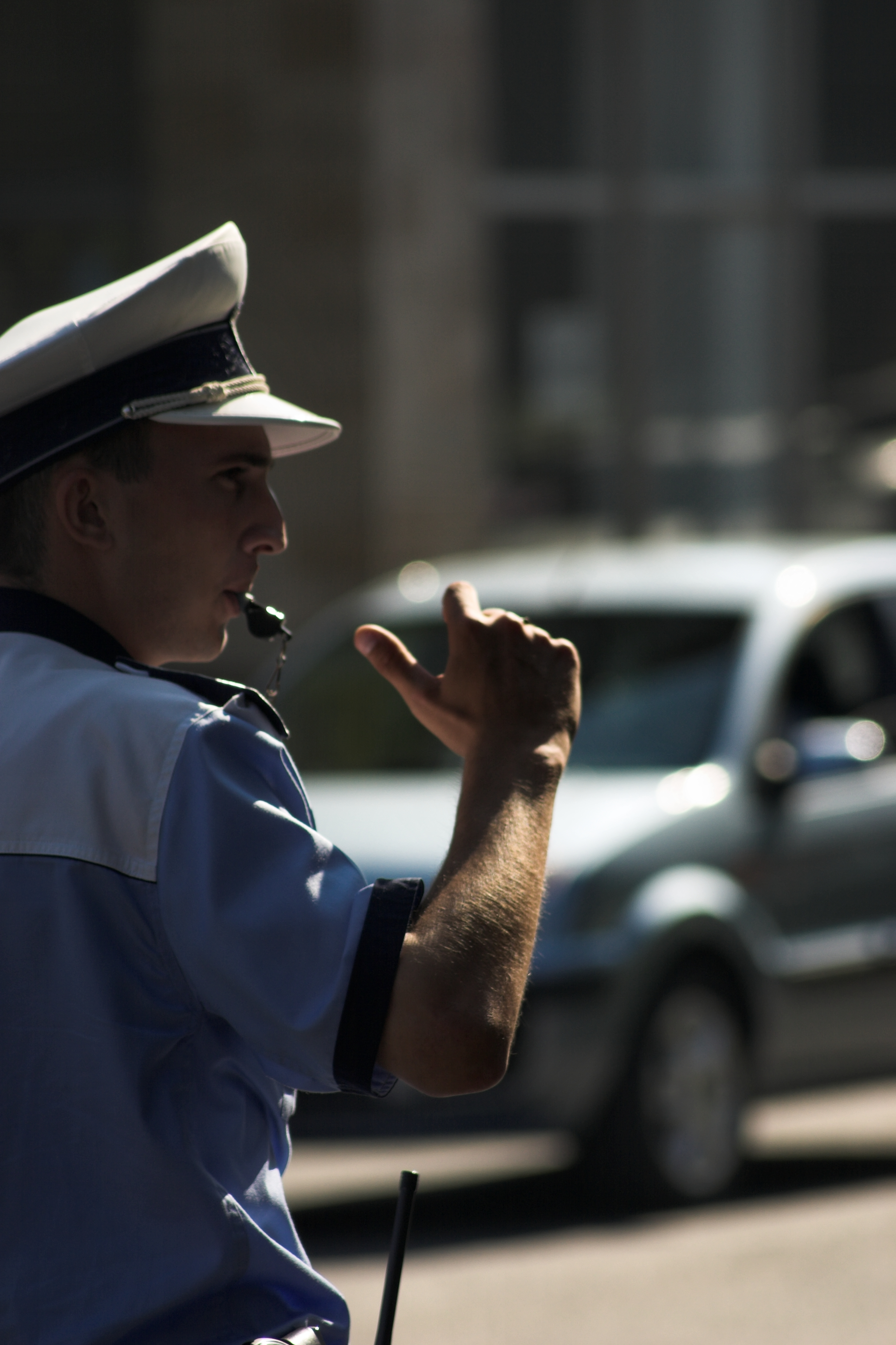 Traffic police in Arad, Romania.